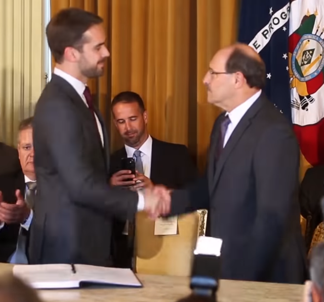 O governador eleito Eduardo Leite cumprimenta o governador incumbente José Ivo Sartori na cerimônia de posse, em janeiro de 2019.